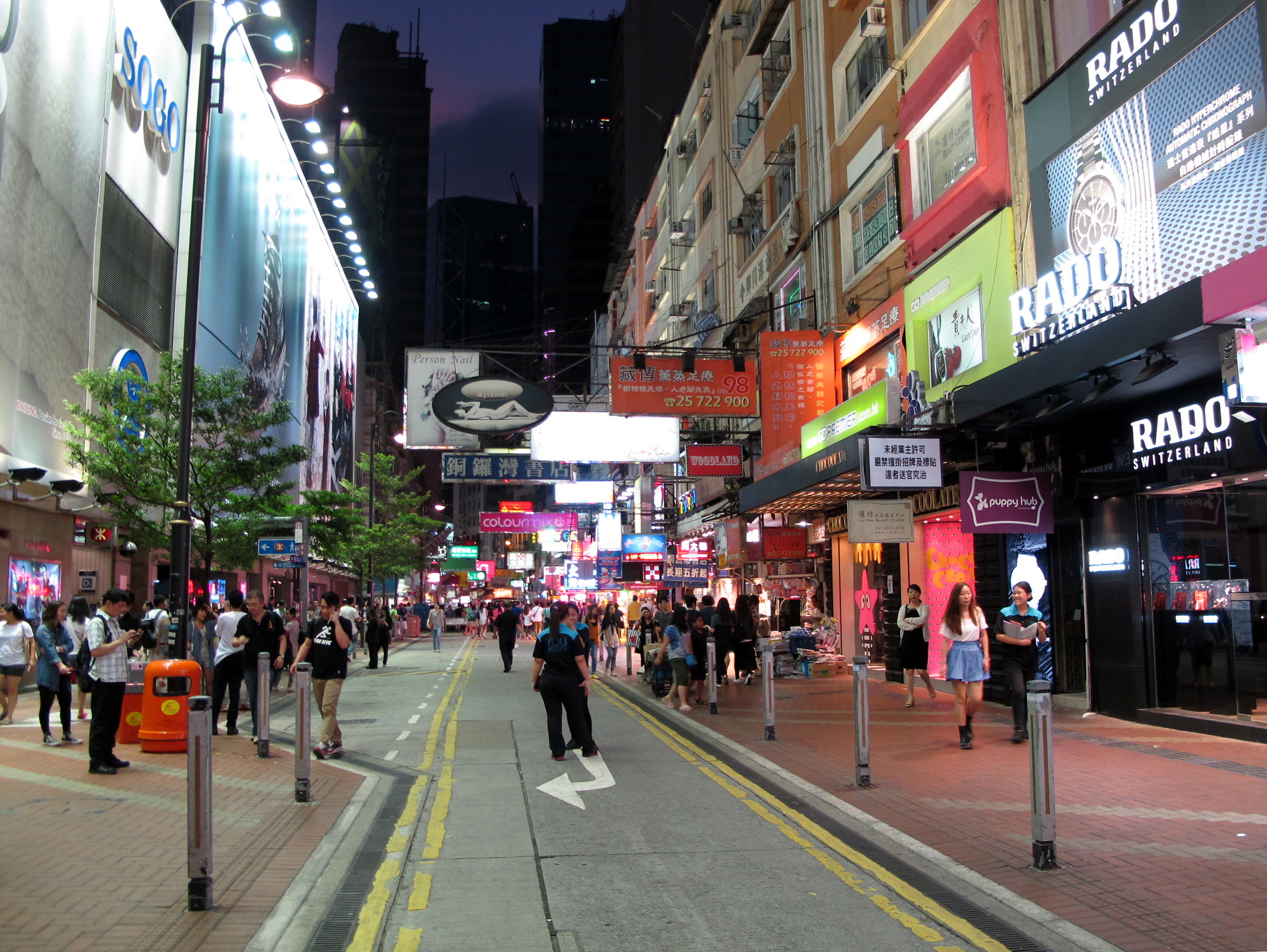 Lockhart Road 駱克道